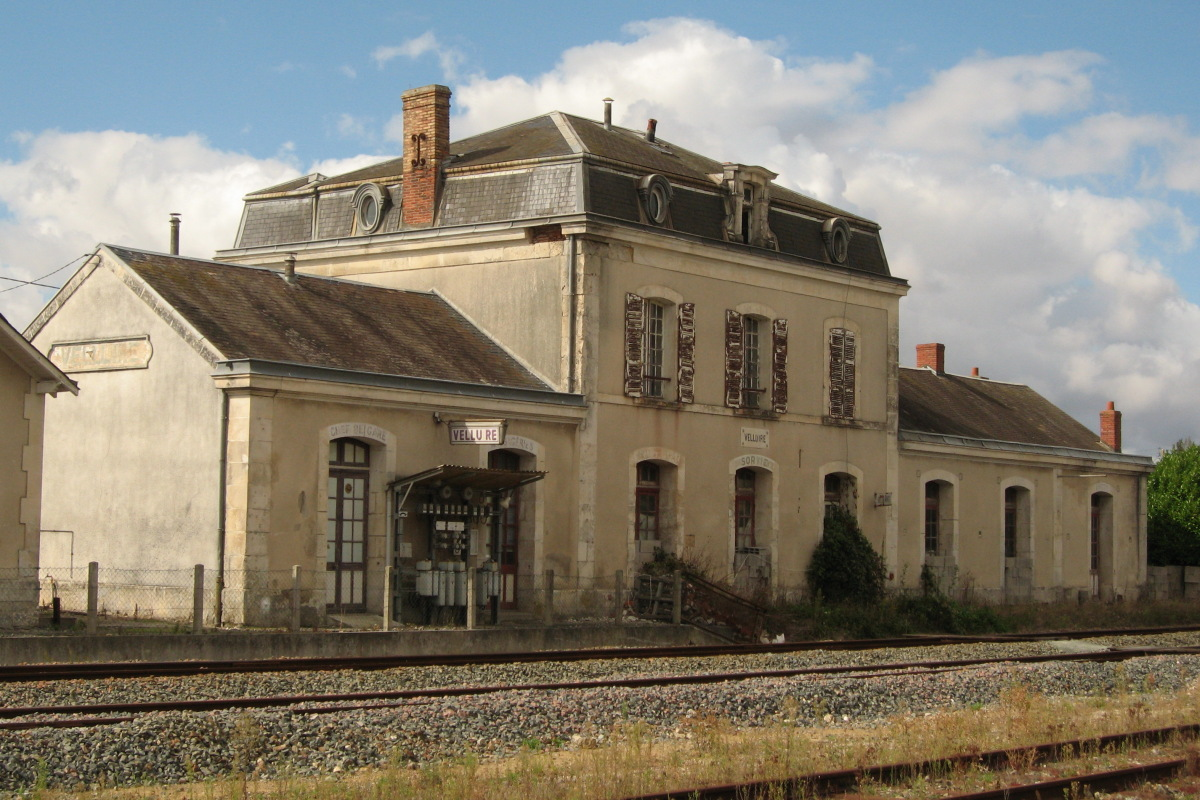 Ancien bâtiment voyageurs de la gare de Velluire vu du côté des voies.